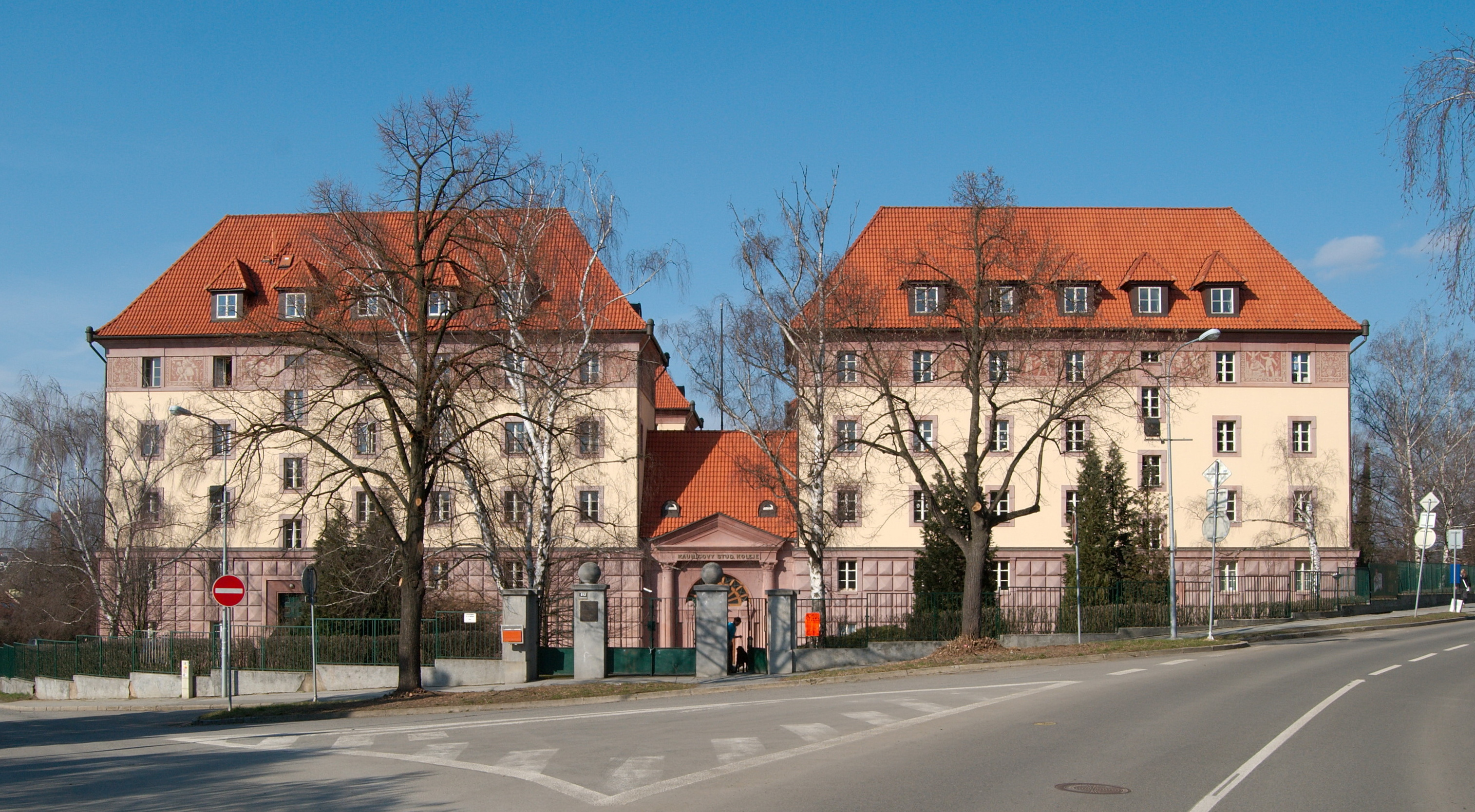 Brno-Žabovřesky - Kaunicovy studentské koleje